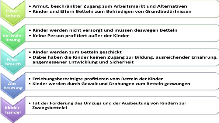 Einordnung Zwangsbettelei bei Kindern